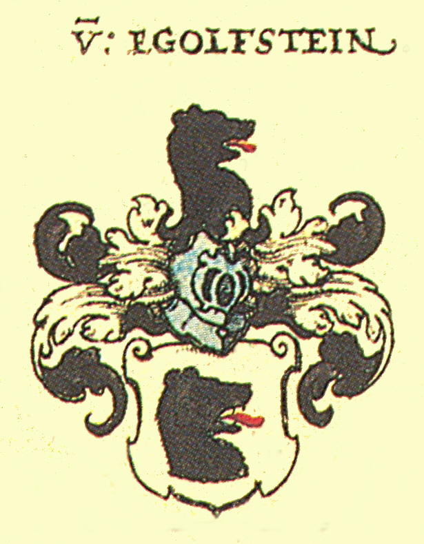 Wappen des Fränkischen Adelsgeschlechts Egloffstein